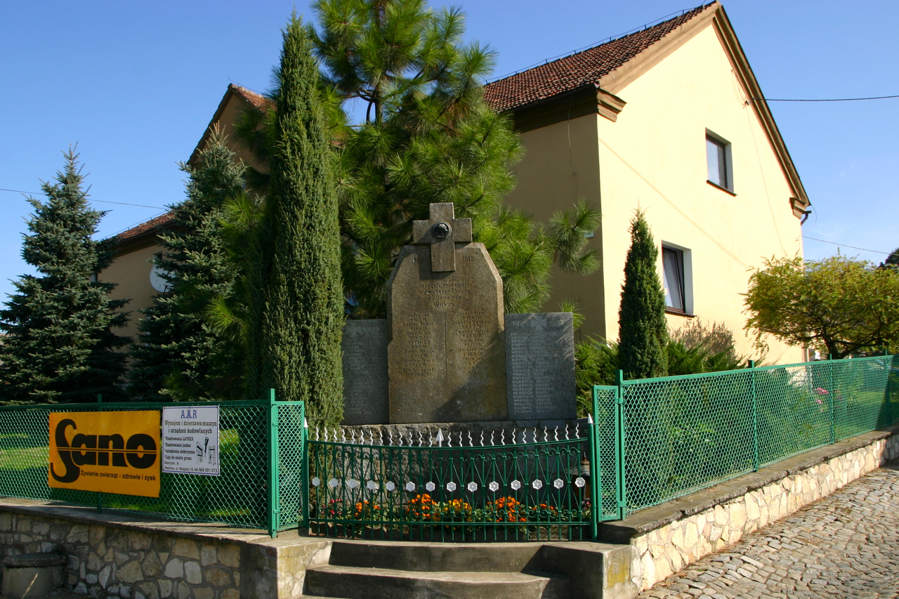 Wilków (dodatkowa nazwa w j. niem. Wilkau) – wieś w Polsce położona w województwie opolskim, w powiecie prudnickim, w gminie Biała.